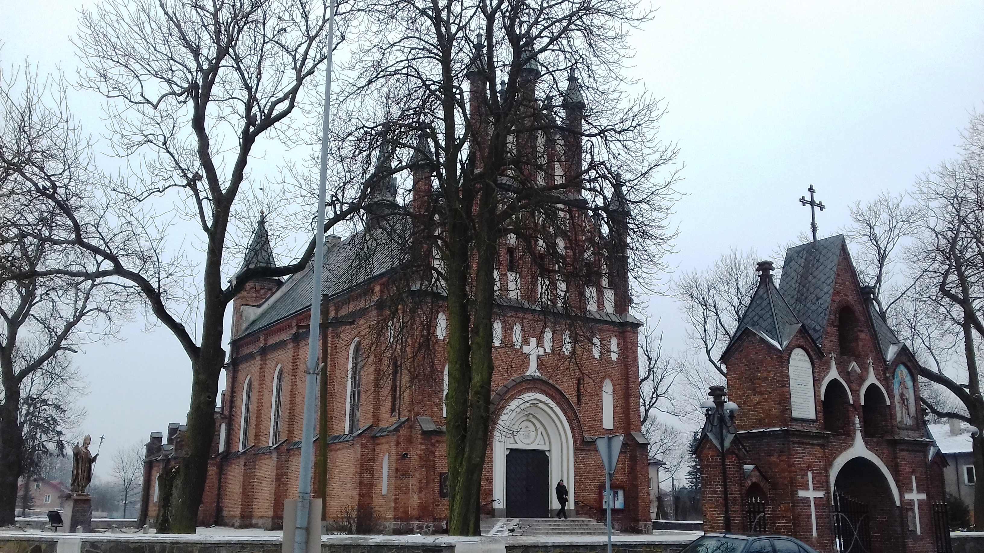 Dobre (gm. Dobre, pow. Mińsk Mazowiecki) - kościół Św. Mikołaja